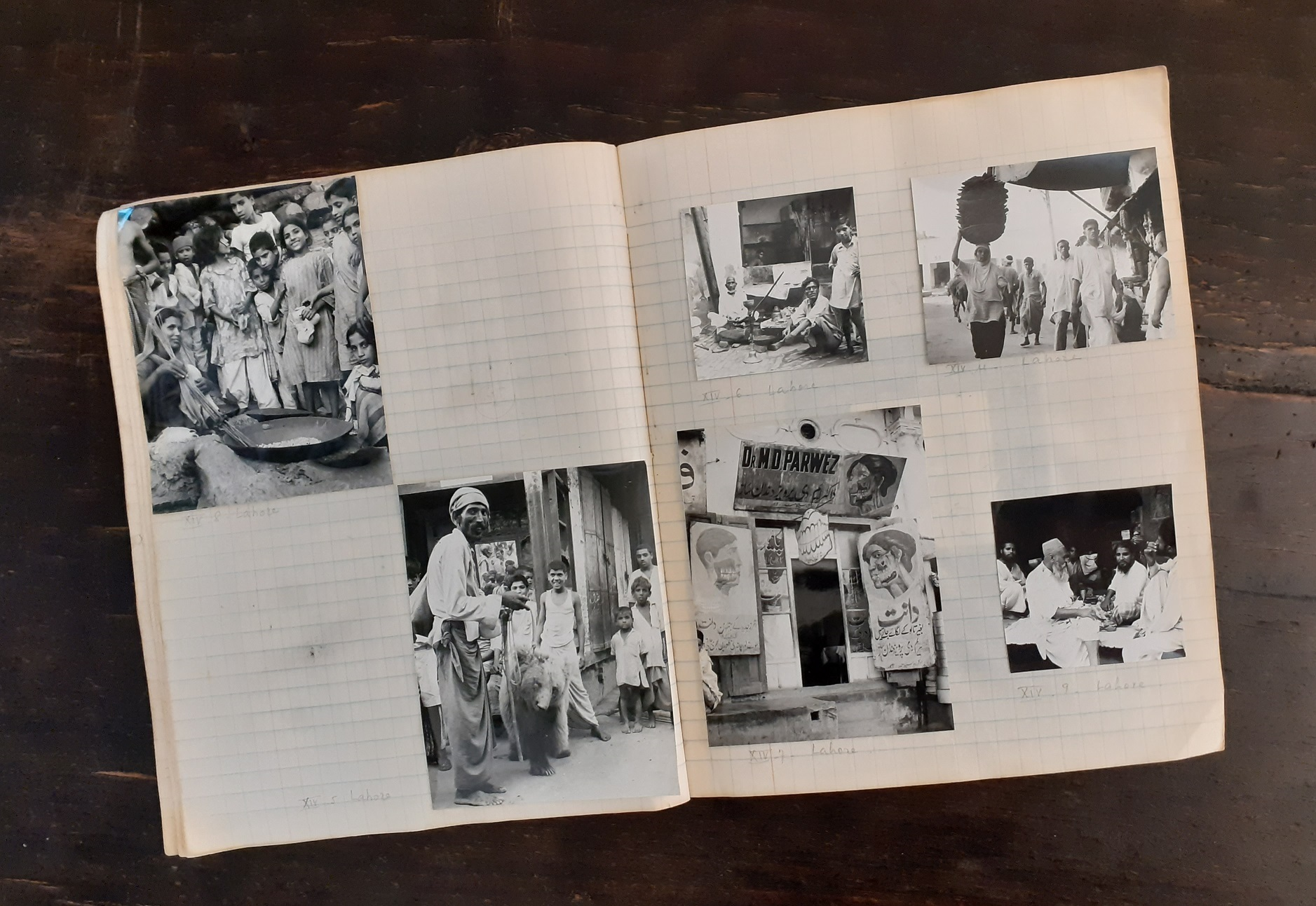 Carnet de photos choisies de Jean-Maurice et Françoise CART 1962